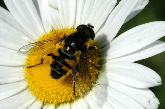 Picture taken in Commanster, Belgian High Ardennes . Species: male Eristalis jugorum